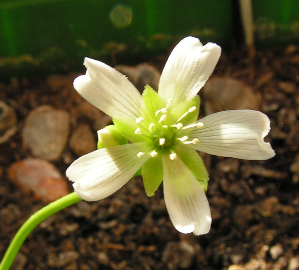 A blooming Dionaea muscipula